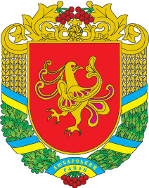 Герб Любарського району